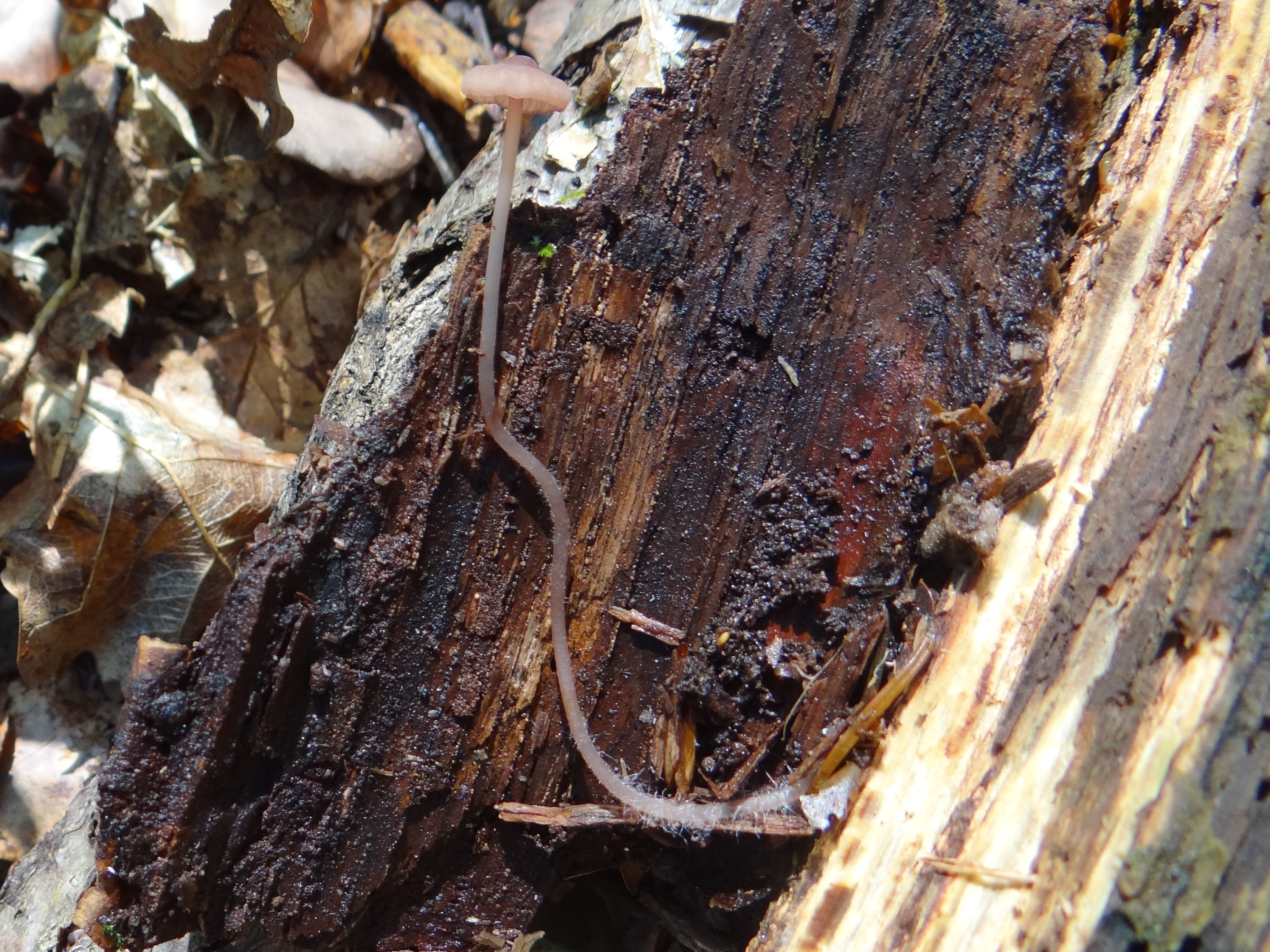 Mycena sanguinolenta (location: Poland)